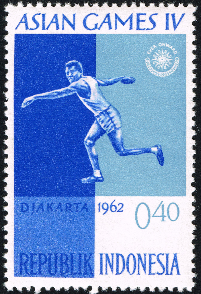 Asian Games IV